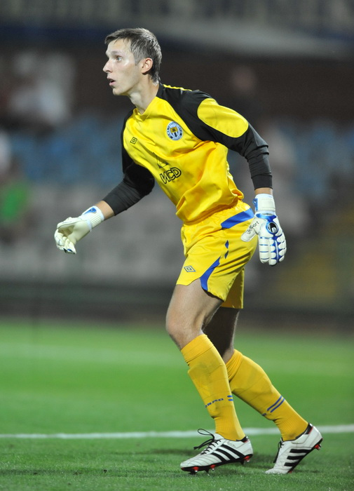 Александр Викторович Бандура — украинский футболист.